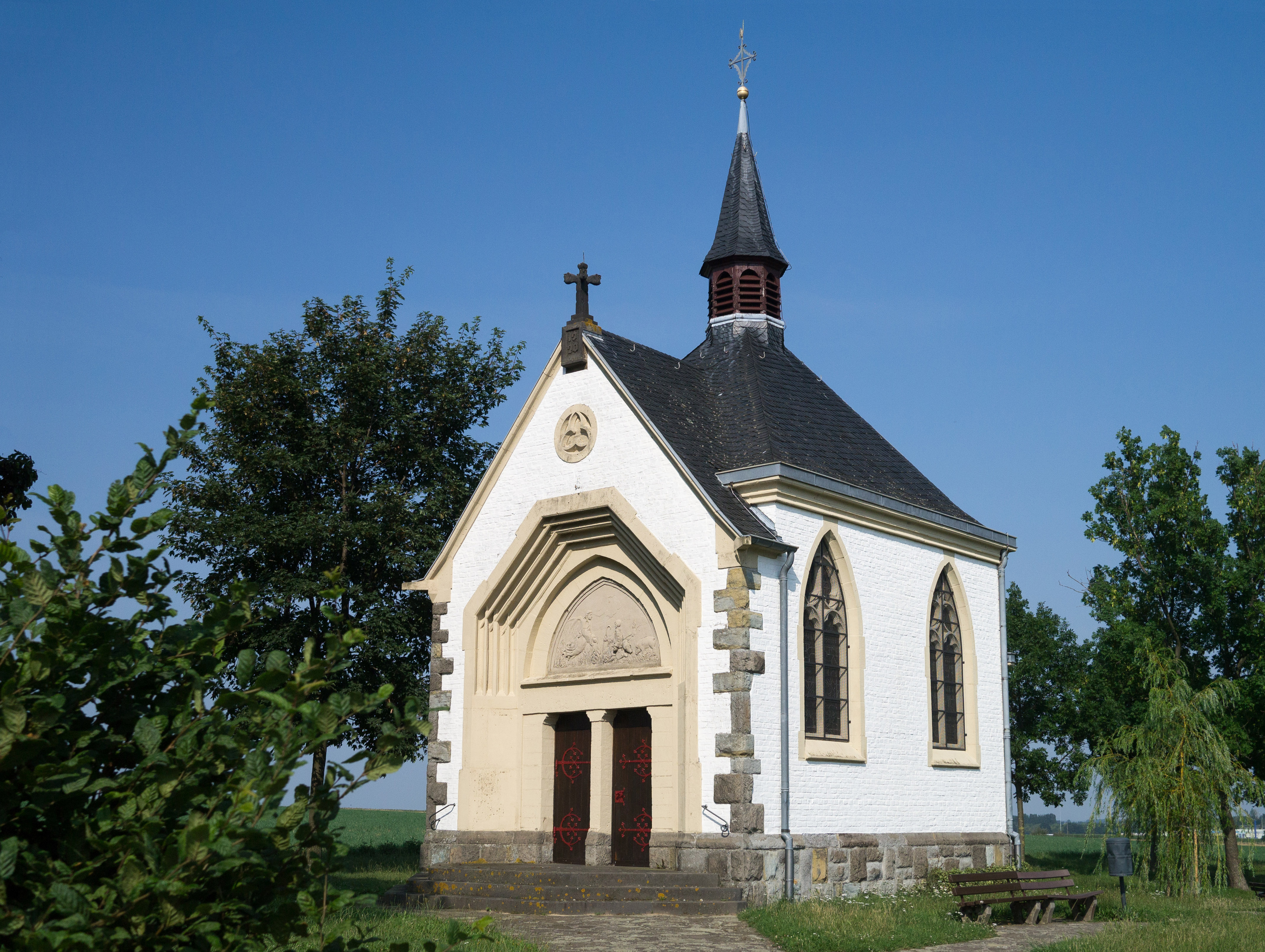 Alderikuskapelle bei Zülpich-Füssenich This is a photograph of an architectural monument.